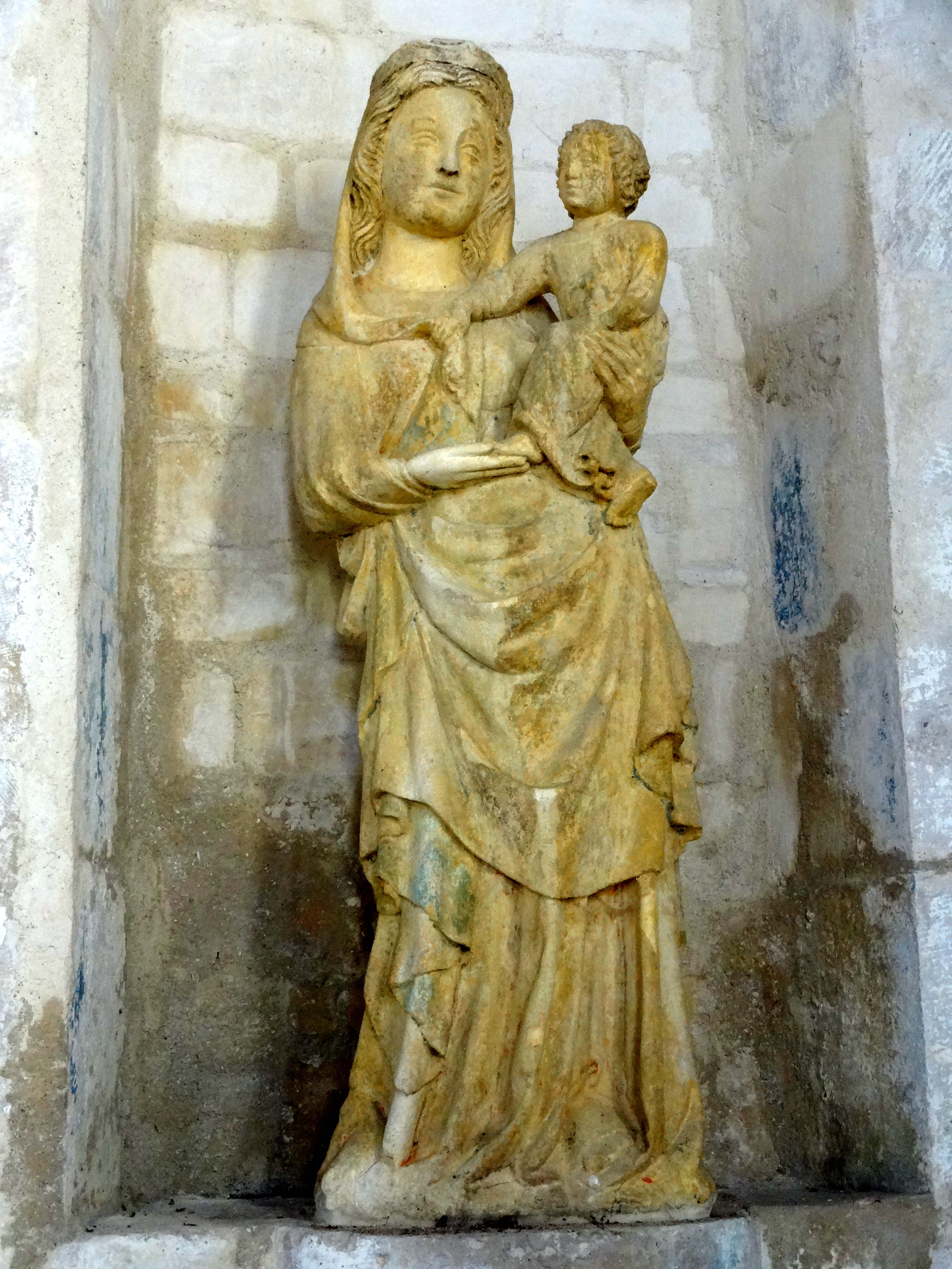 Mobilier de l'église - voir titre.